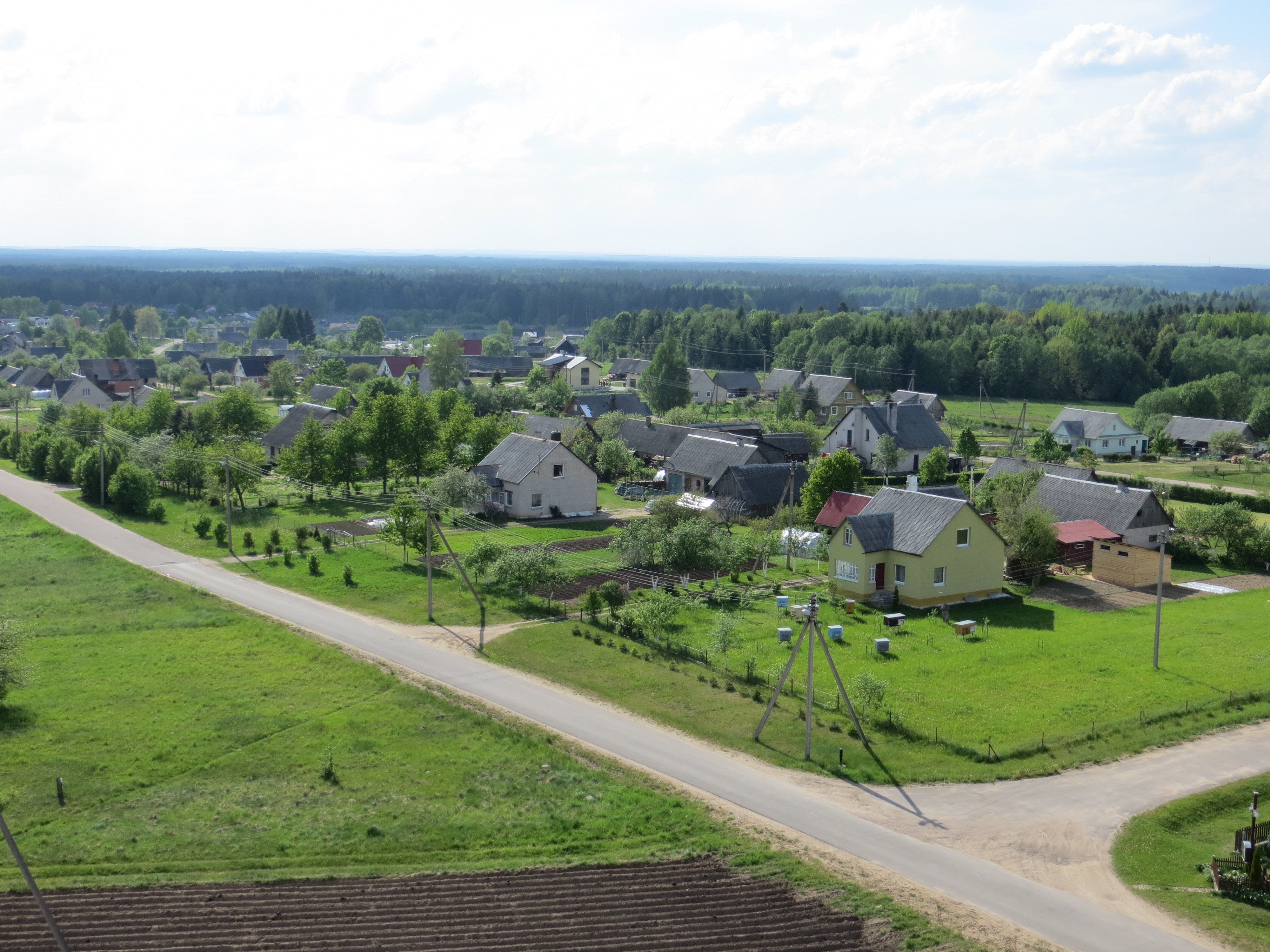 Mostiškės, Lithuania